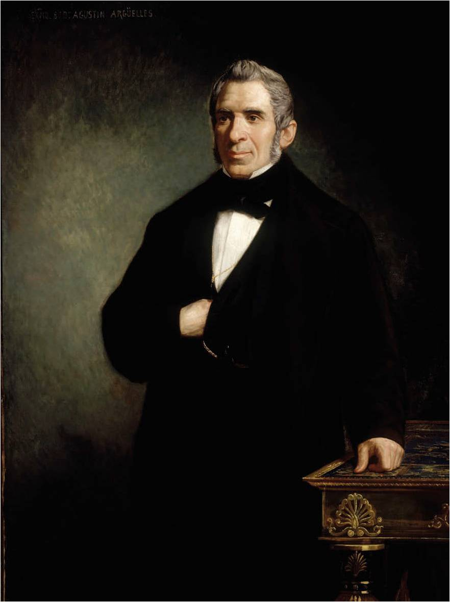 Retrato del abogado, diplomático y político español Agustín de Argüelles Álvarez (1776-1844).